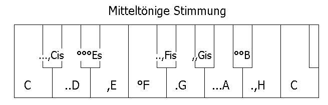 Mitteltönige Tastatur mit Centangabe